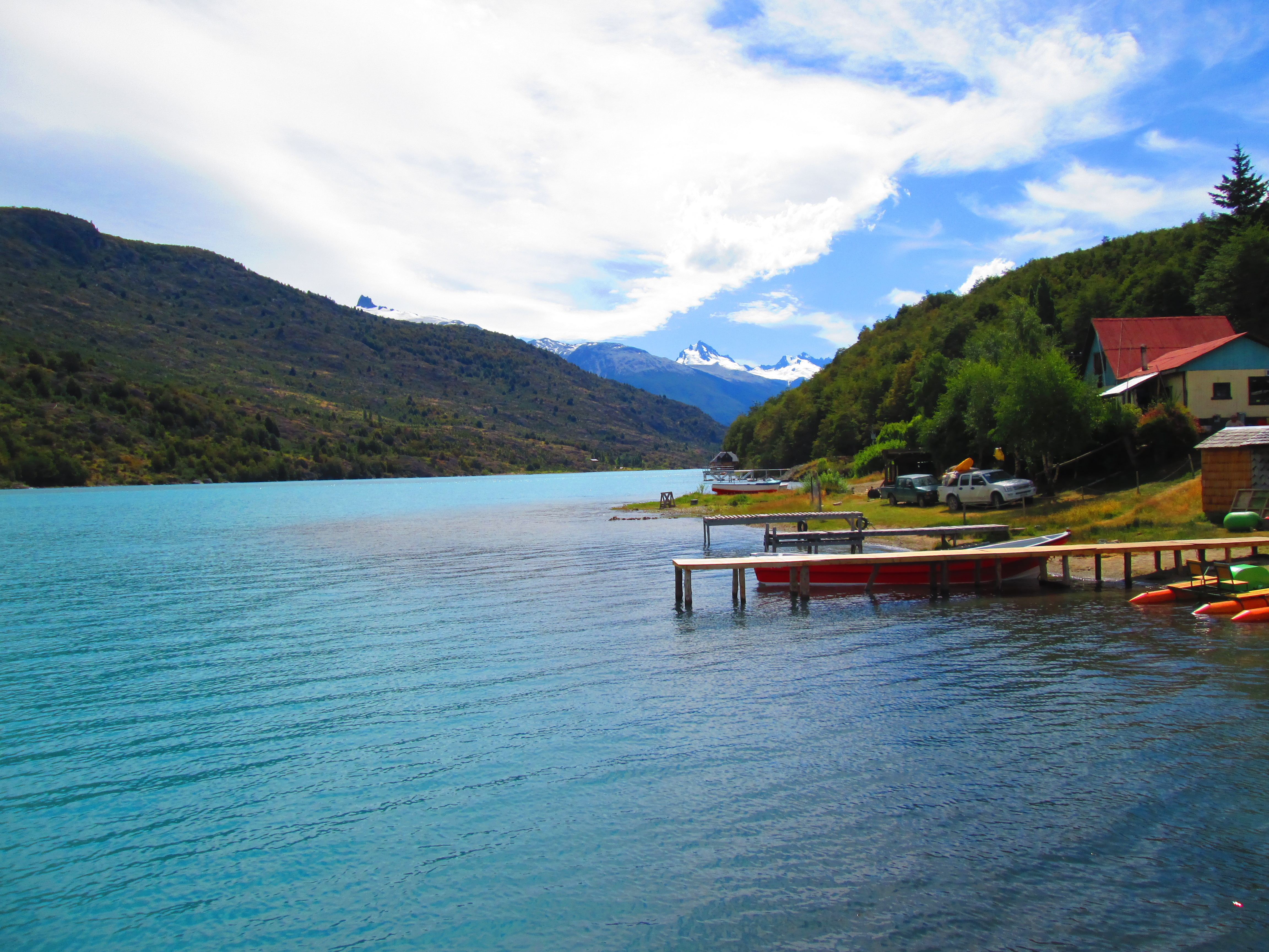 Lago Bertrand desde Puerto Bertrand